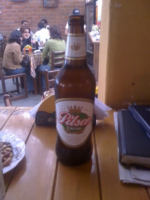 Botella de Cerveza Pilsen Callao